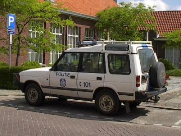 Politiejeep in Baarle-Hertog, eigen foto